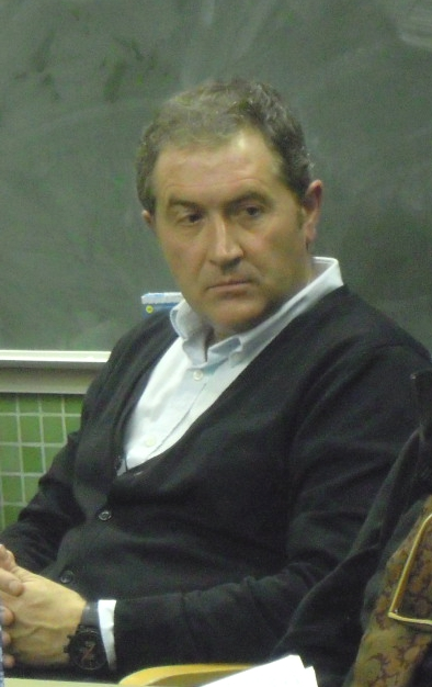 Xosé Antonio Fernández Salgado no simposio Un galego común, fiel a si mesmo, organizado polo Instituto da Lingua Galega na Facultade de Filoloxía de Santiago de Compostela